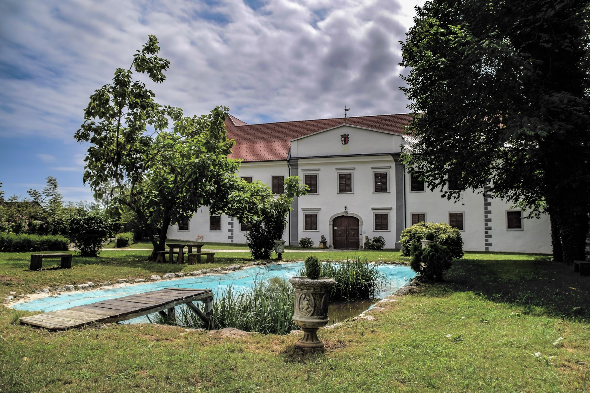 Grad Raka